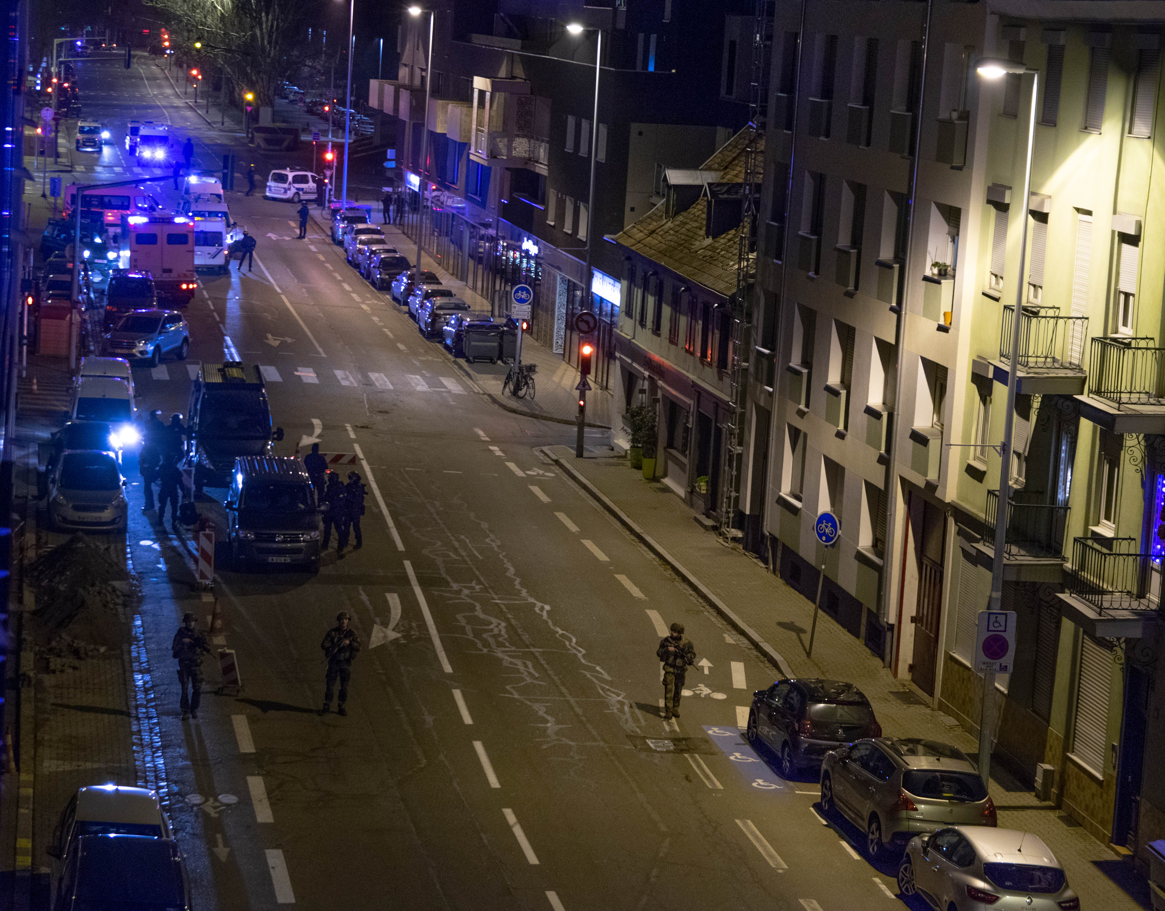 Intervention des services de police le soir de l'attentat à Strasbourg, 11 décembre 2018, route de l'hôpital.